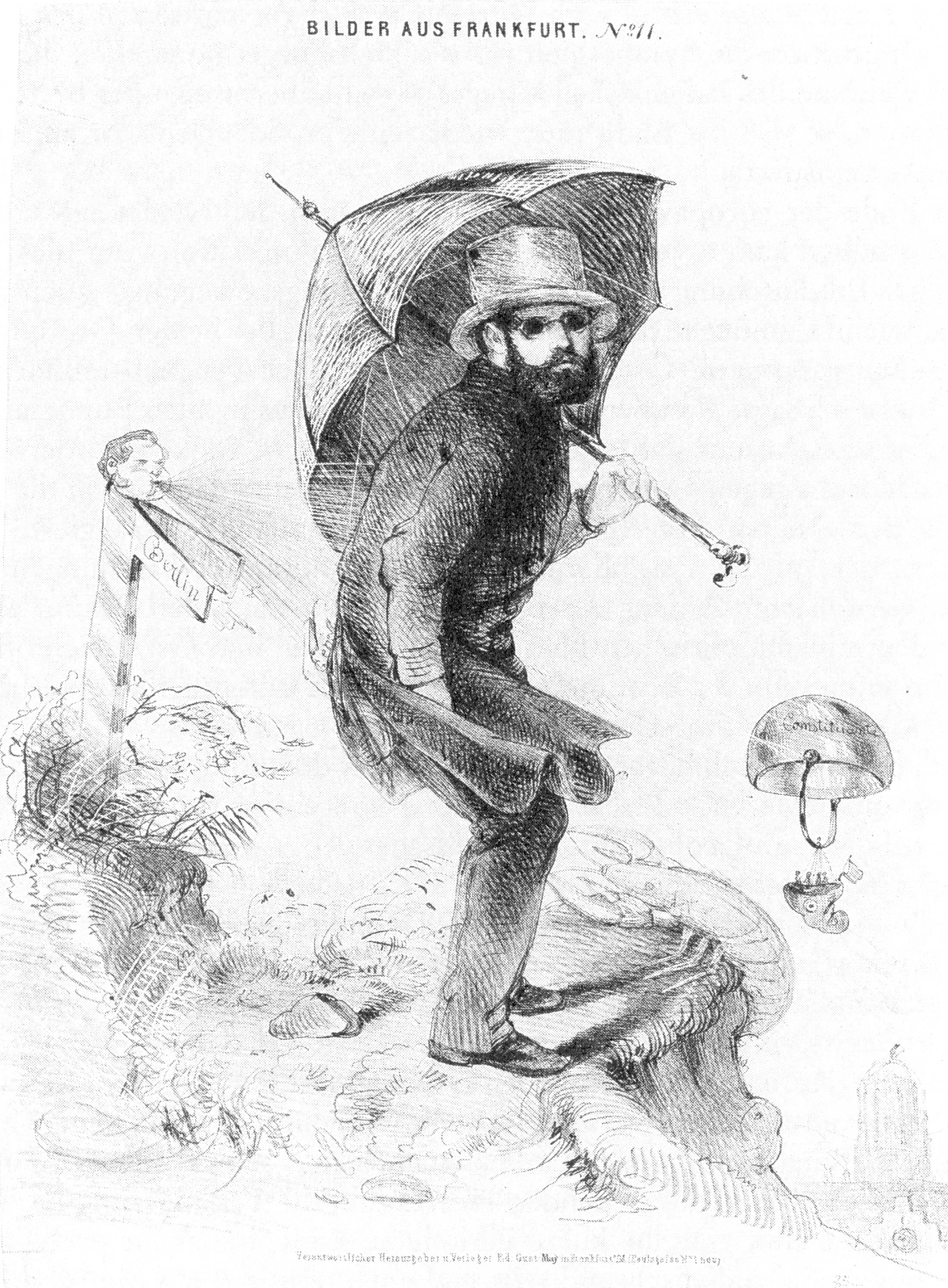 Lithographie, Ernst Schalck. Ende 1849 / Anfang 1850. Friedrich Sigmund Jucho, Nachlassverwalter der Nationalversammlung. Der Krebs am Abgrund symbolisiert die Reaktion.